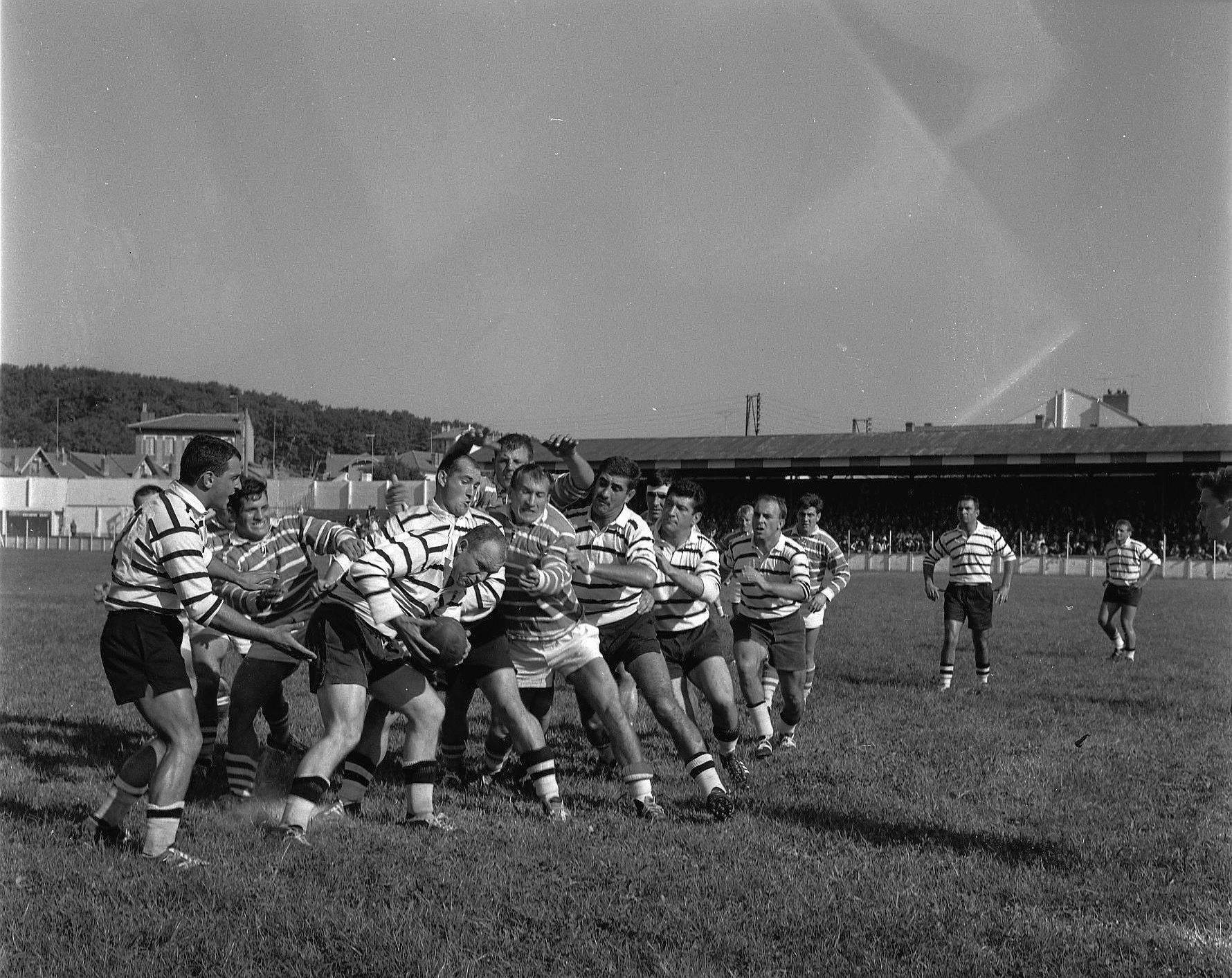 Stade du TOEC. Le 7 Octobre 1962. Vue d'une phase de jeu entre le TOEC et Brive.